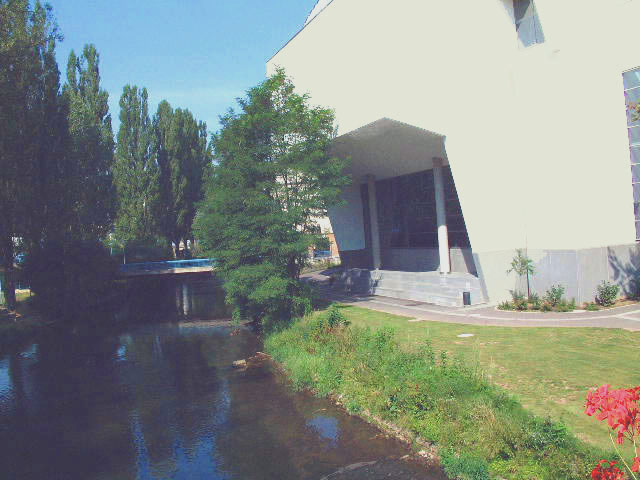 Ettelbréck: Centre culturel. Kategorie:Gemeng Ettelbréck